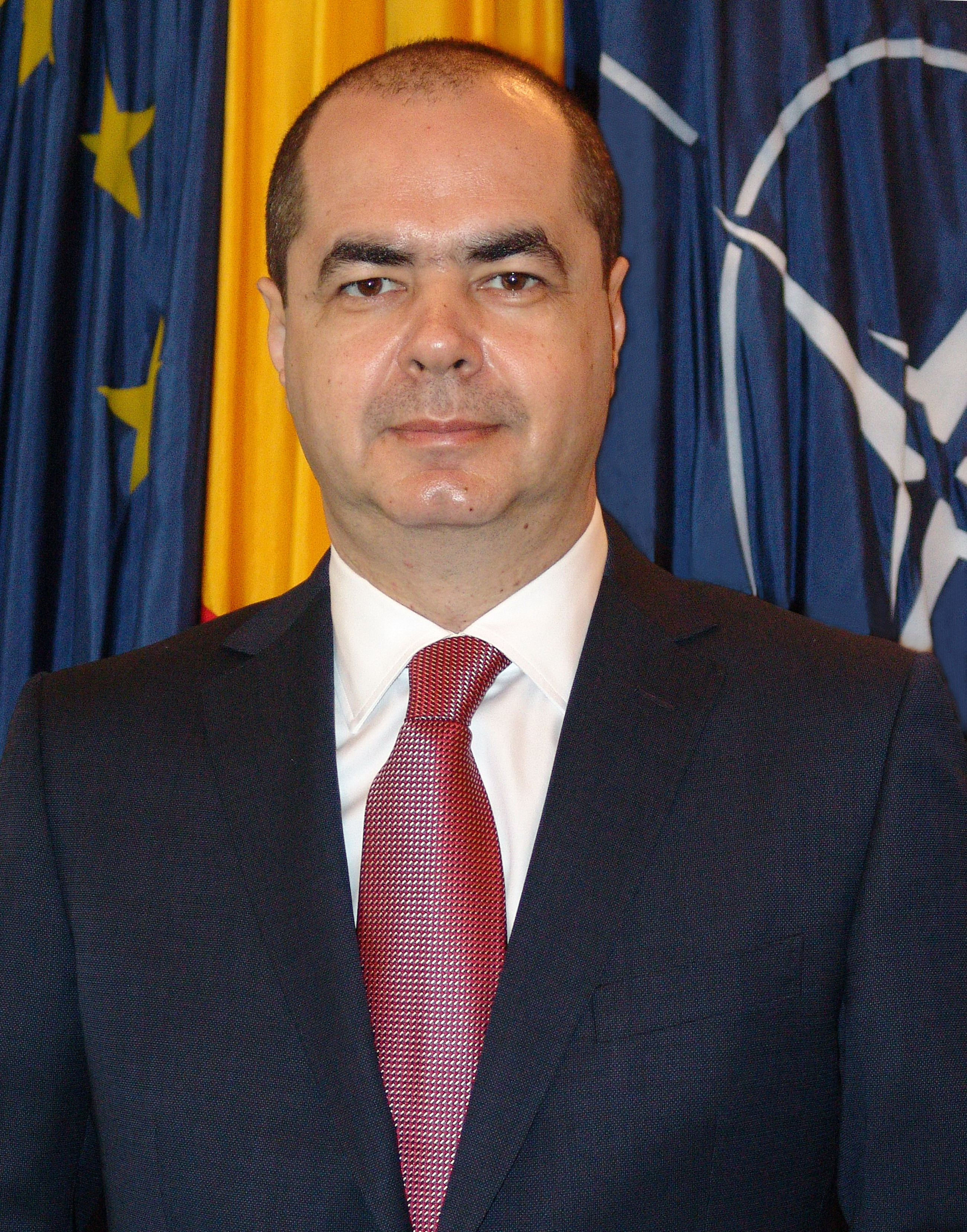 Mihai Stănișoară (former Minister of National Defence)